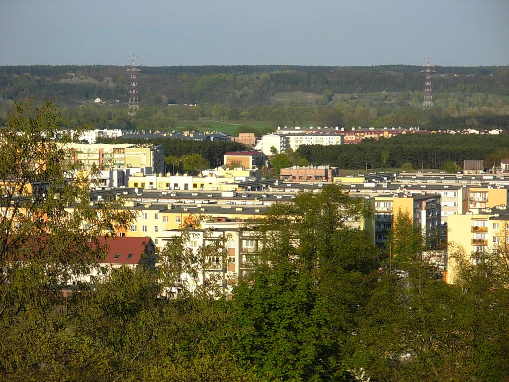 Widok ze Zbocza Fordońskiego